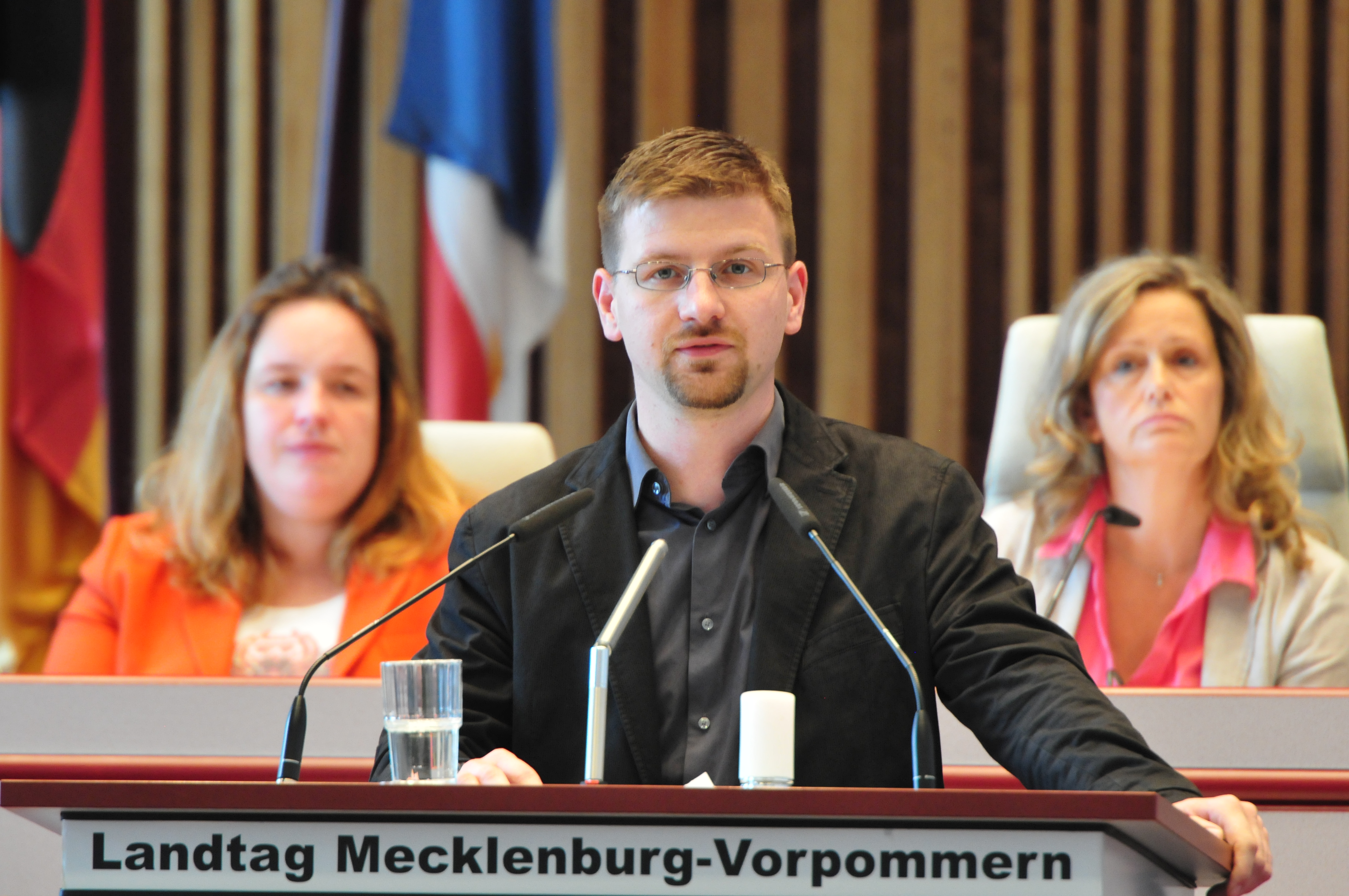 Landtagssitzung des Landtages von Mecklenburg-Vorpommern in Schwerin am 19. Juni 2013.